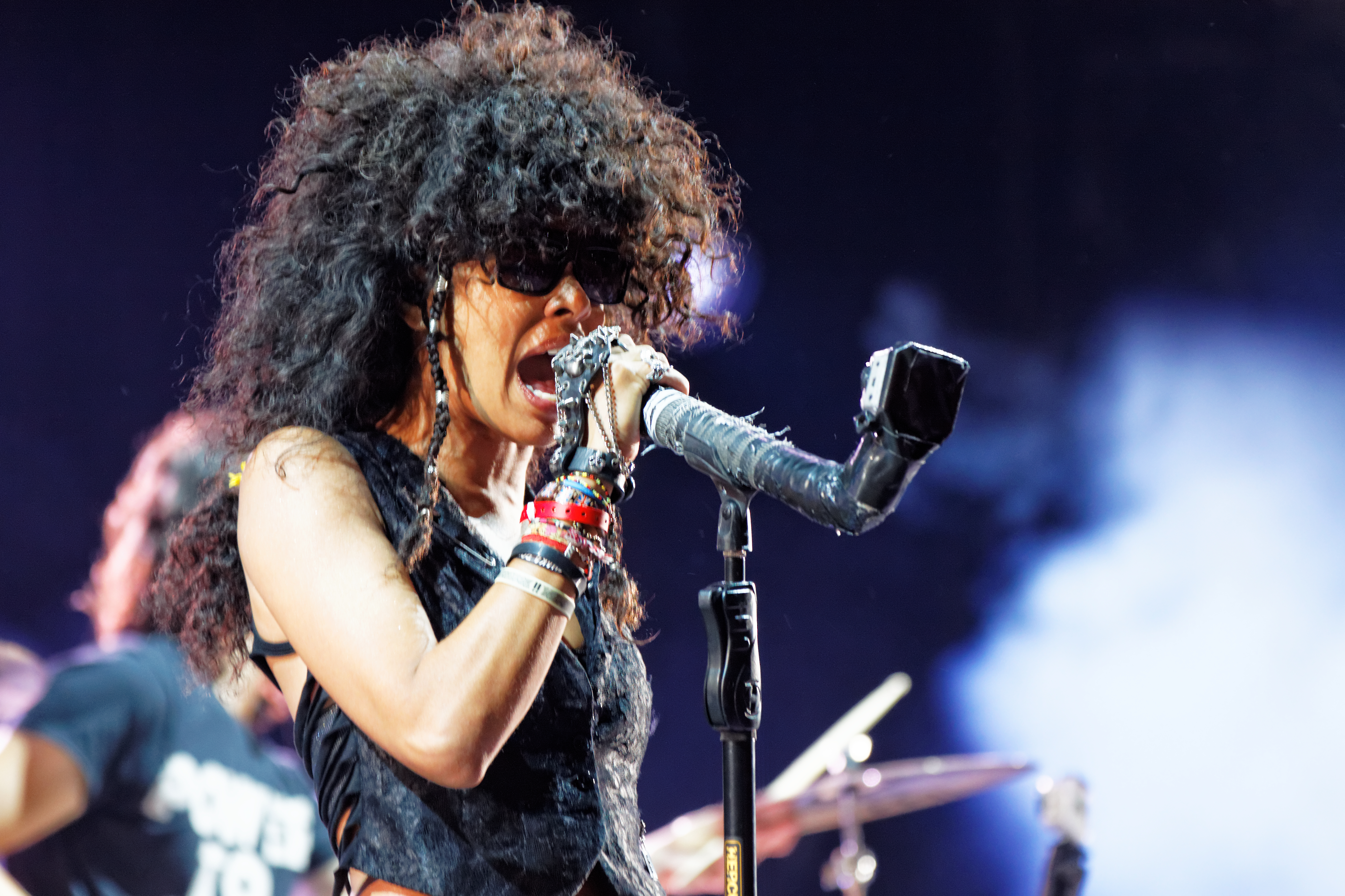 Shaka Ponk en concert sur la grande scène lors de la fête de l'Humanité 2012.